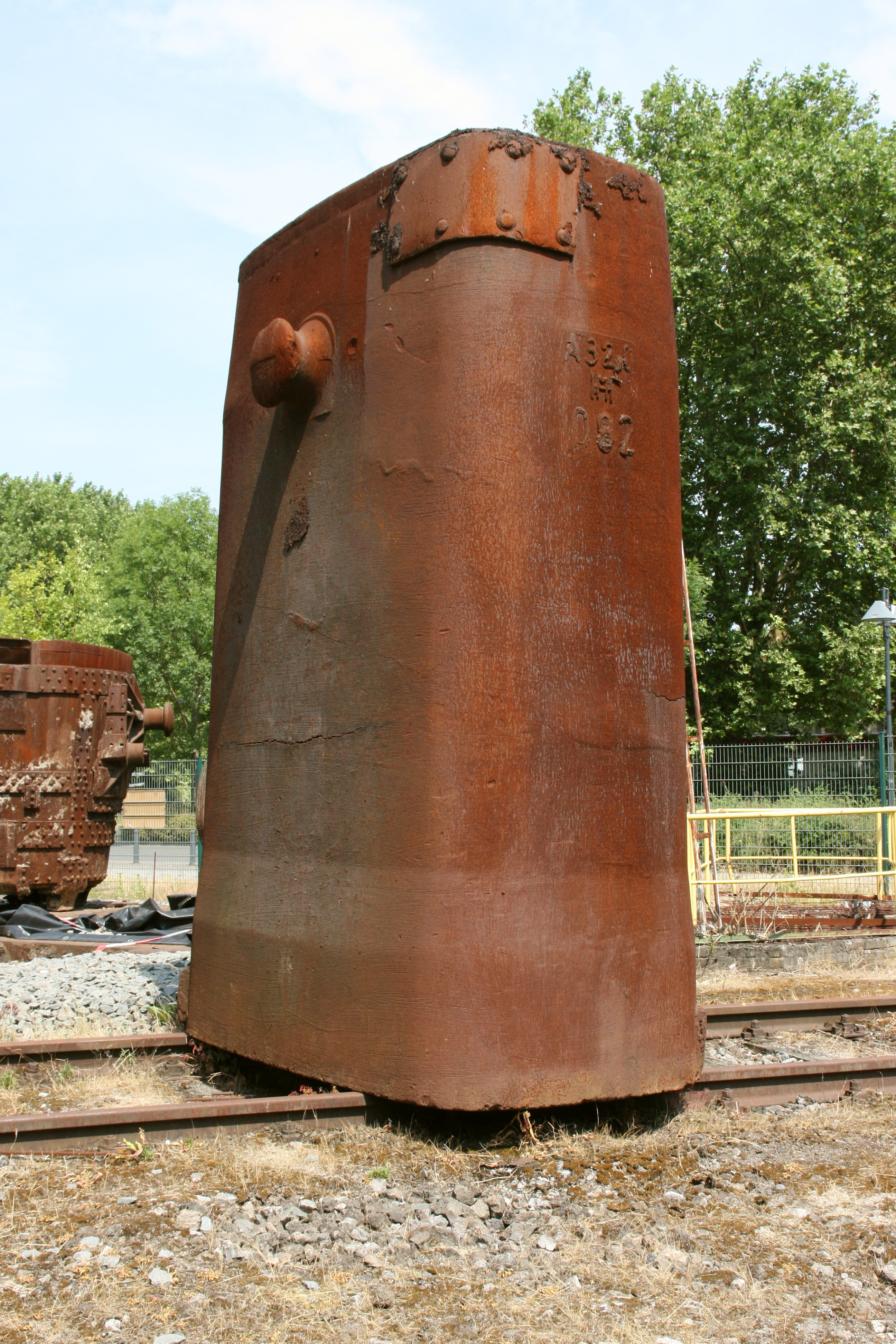 Ehemaliger Schrottplatz der Henrichshütte in Hattingen